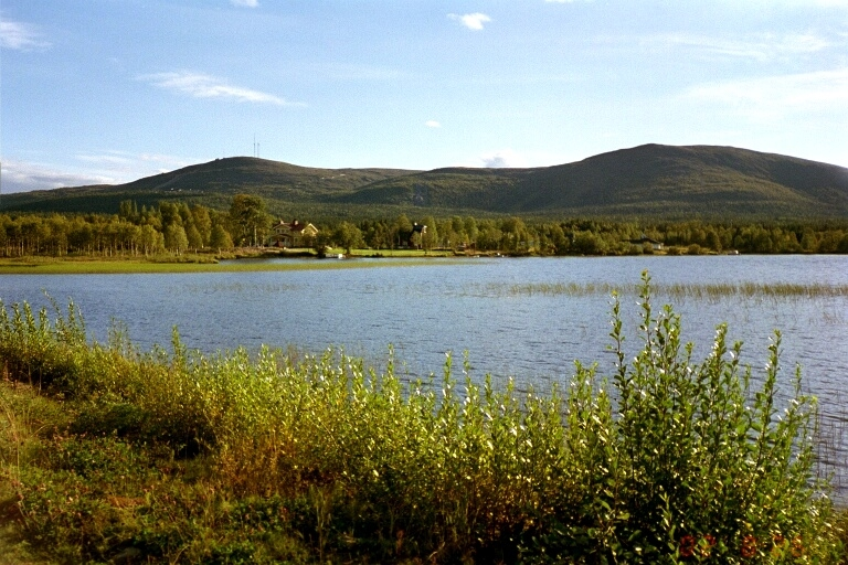 Dundret sett från Vassara träsk Foto:Vinterfrid 2 februari 2005 kl.04.16 Vinterfrid 768x512 (379362 bytes) (Dundret)